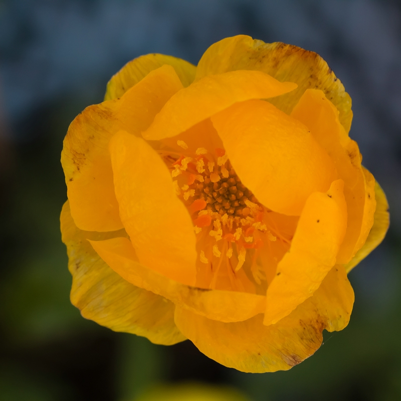 Sachsen: Trollblume als Zierpflanze